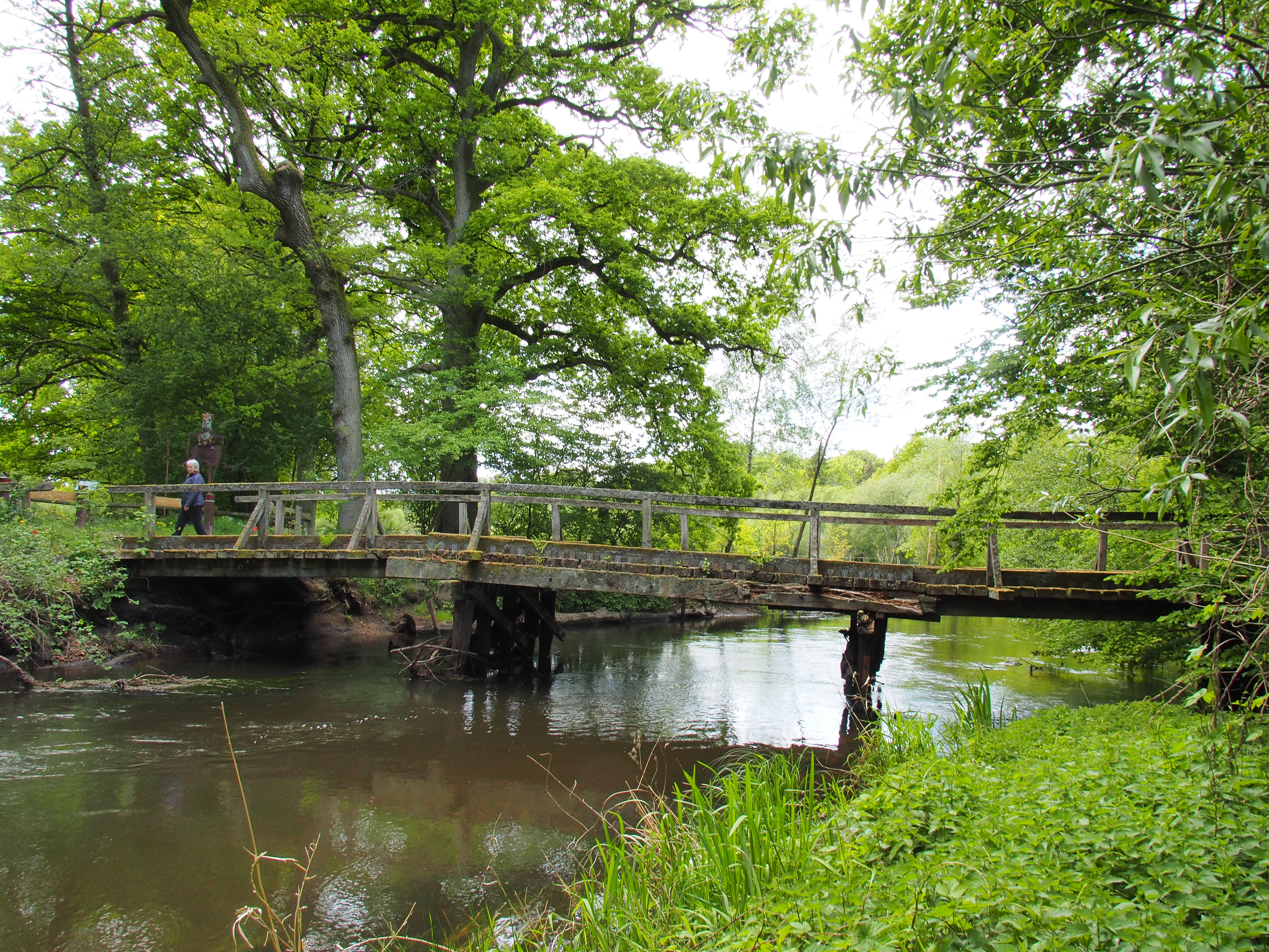 Holzbrücke über die Örtze bei Feuerschützenbostel (Stadt Bergen)